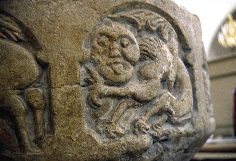 Bråby Kirke i Danmark. Bråby kirke, døbefont